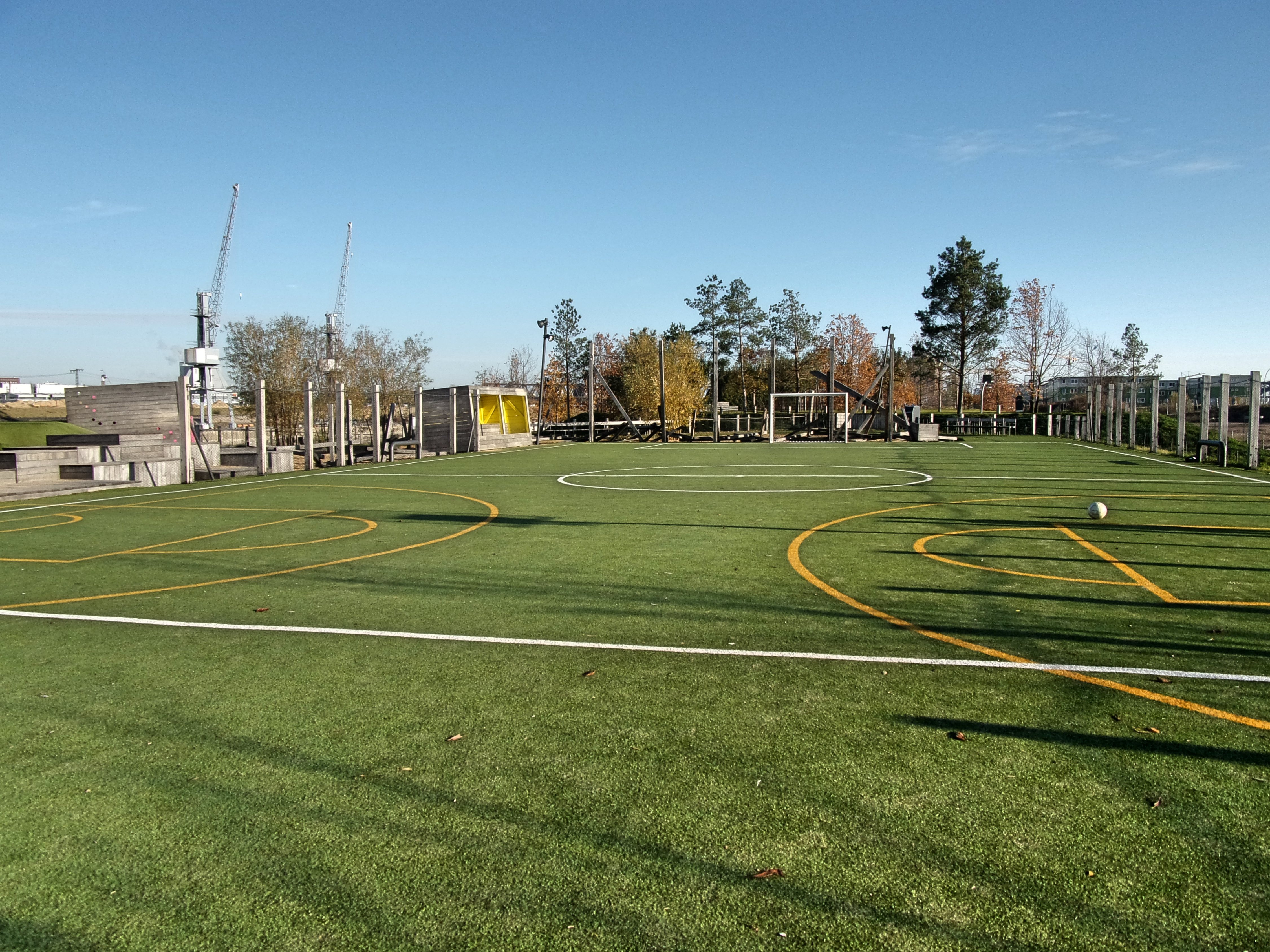 Baakenpark Hamburg, Fußballplatz.